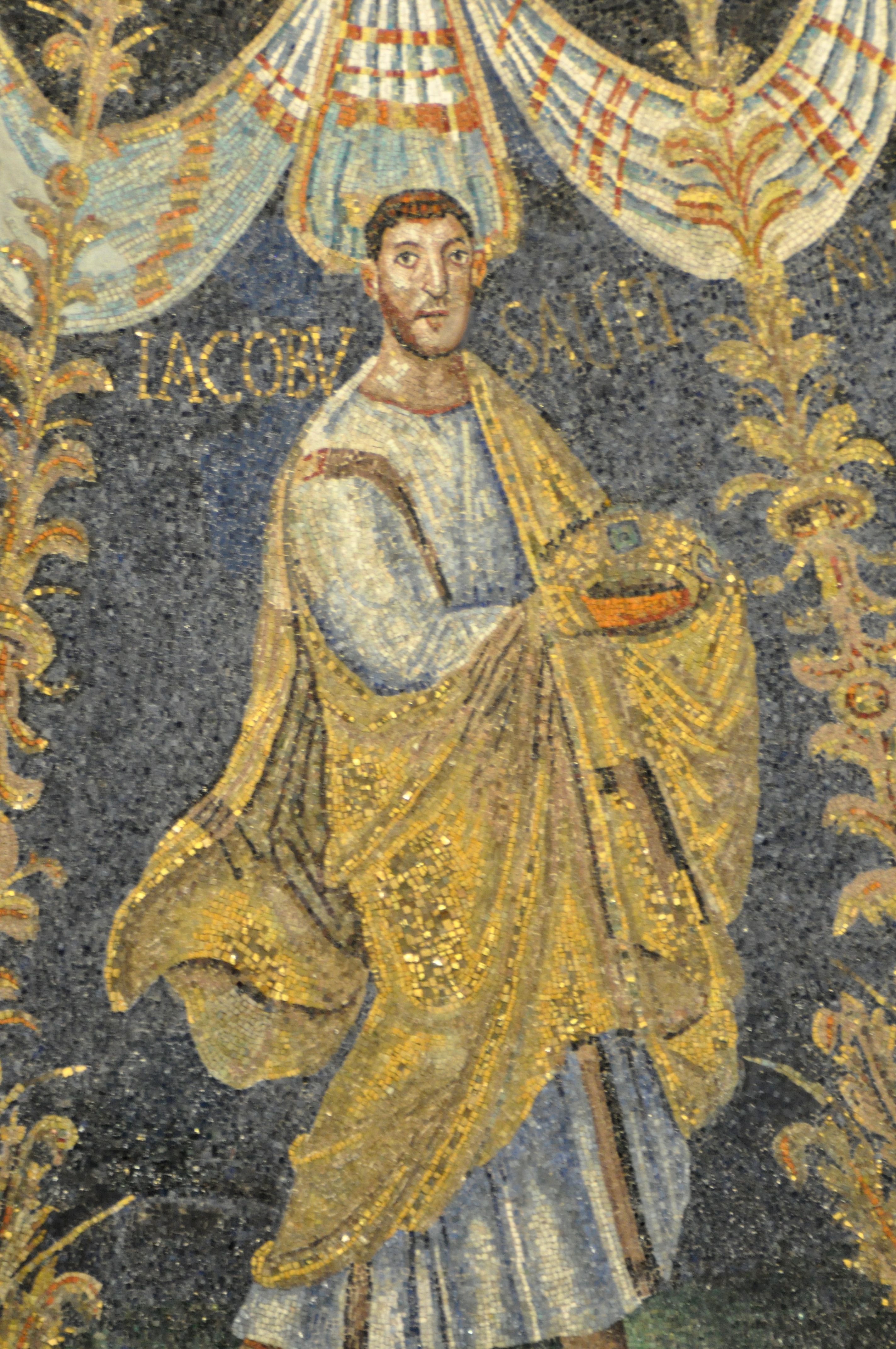 Baptisterio Neoniano en Rávena (Italia). Detalle del mosaico de la cúpula que muestra al apóstol Santiago Alfeo, conocido modernamente como Santiago el Menor.